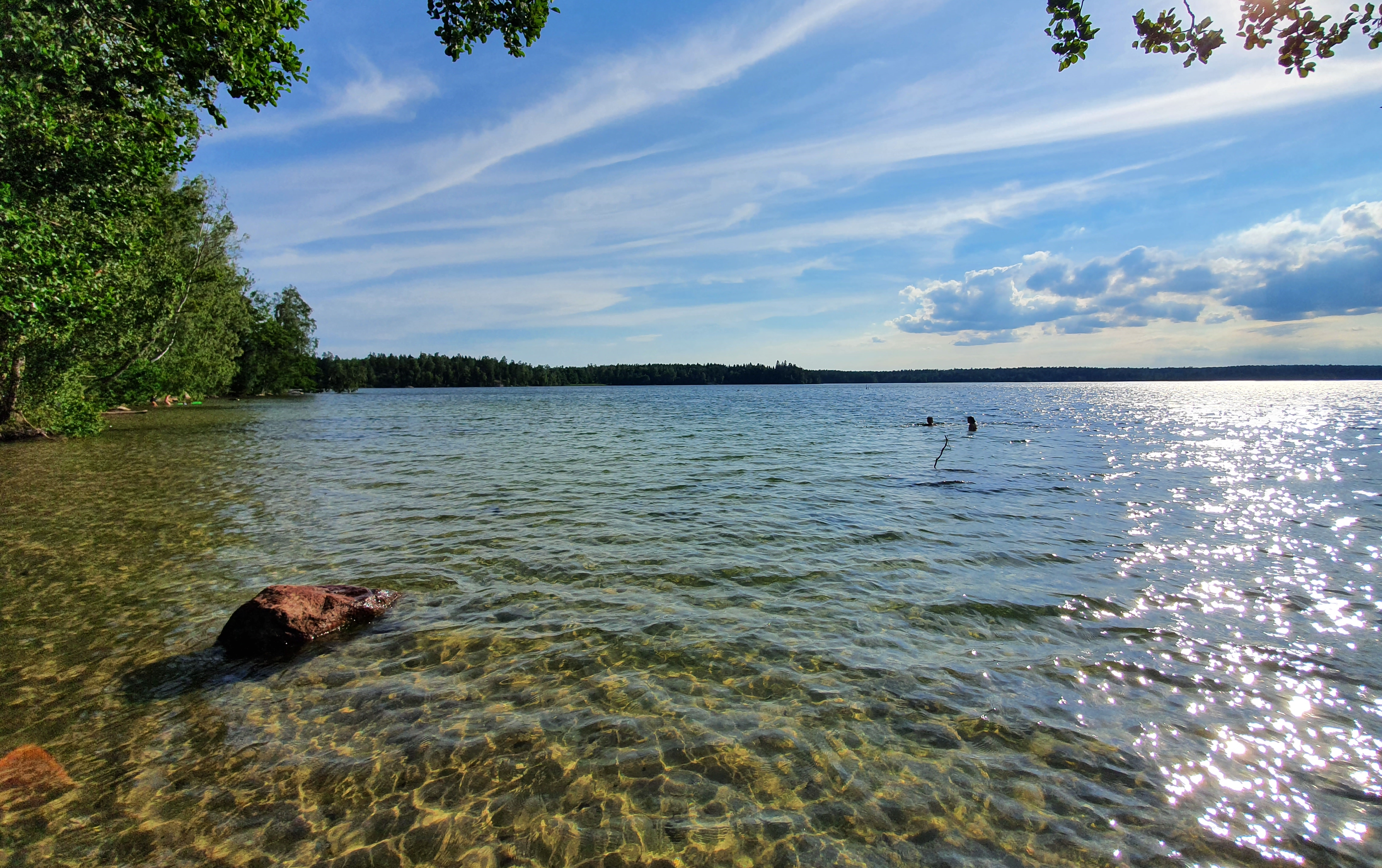 Sjön Largen mellan Vitra bruk och Riala. Bilden är tagen strax intill landsvägen öster om sjön.